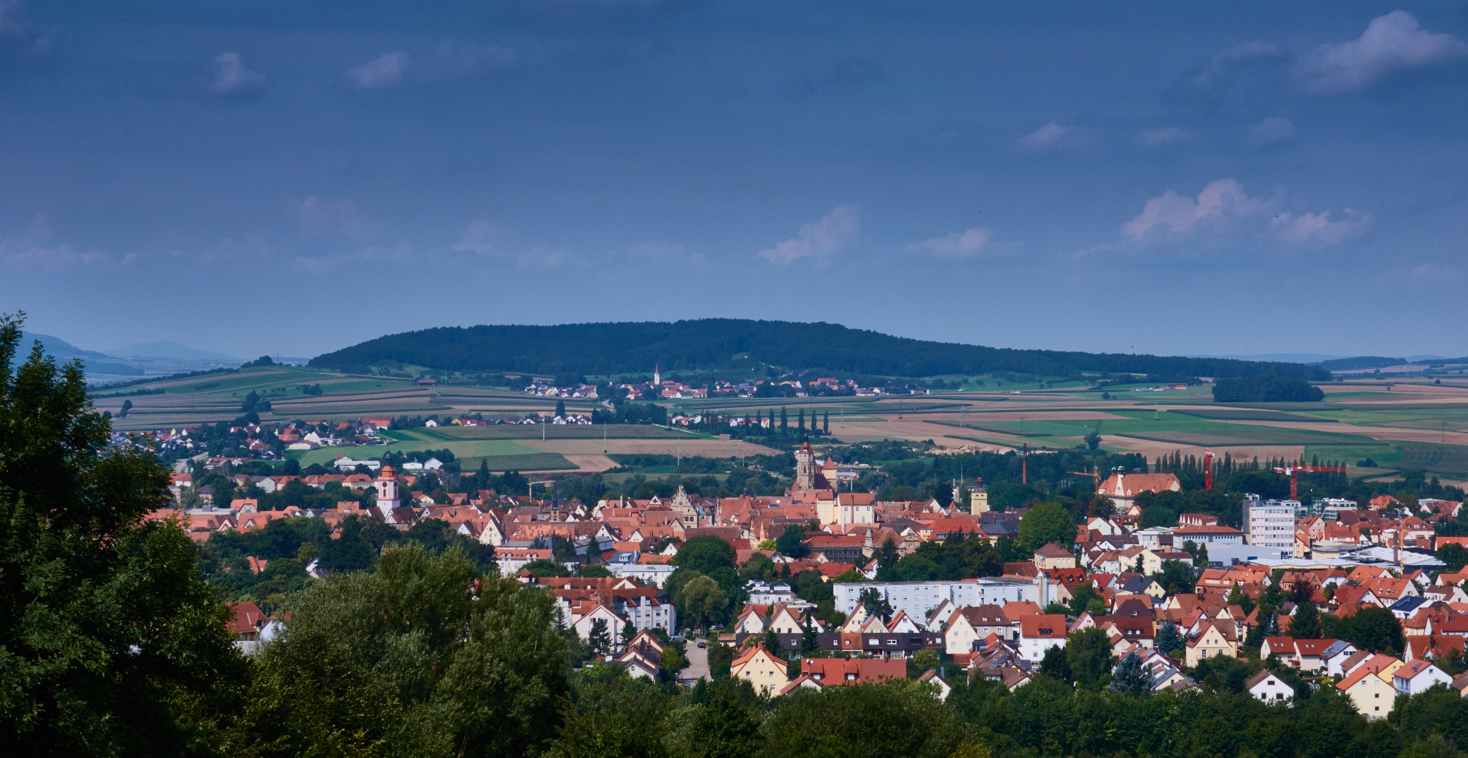 Im Vordergrund Weißenburg, dahinter Weimersheim vor dem Flüglinger Berg, einem Zeugenberg der Weißenburger Alb